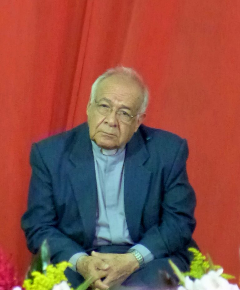 Obispo Auxiliar Emérito de la Arquidiócesis de Santiago de Guatemala.